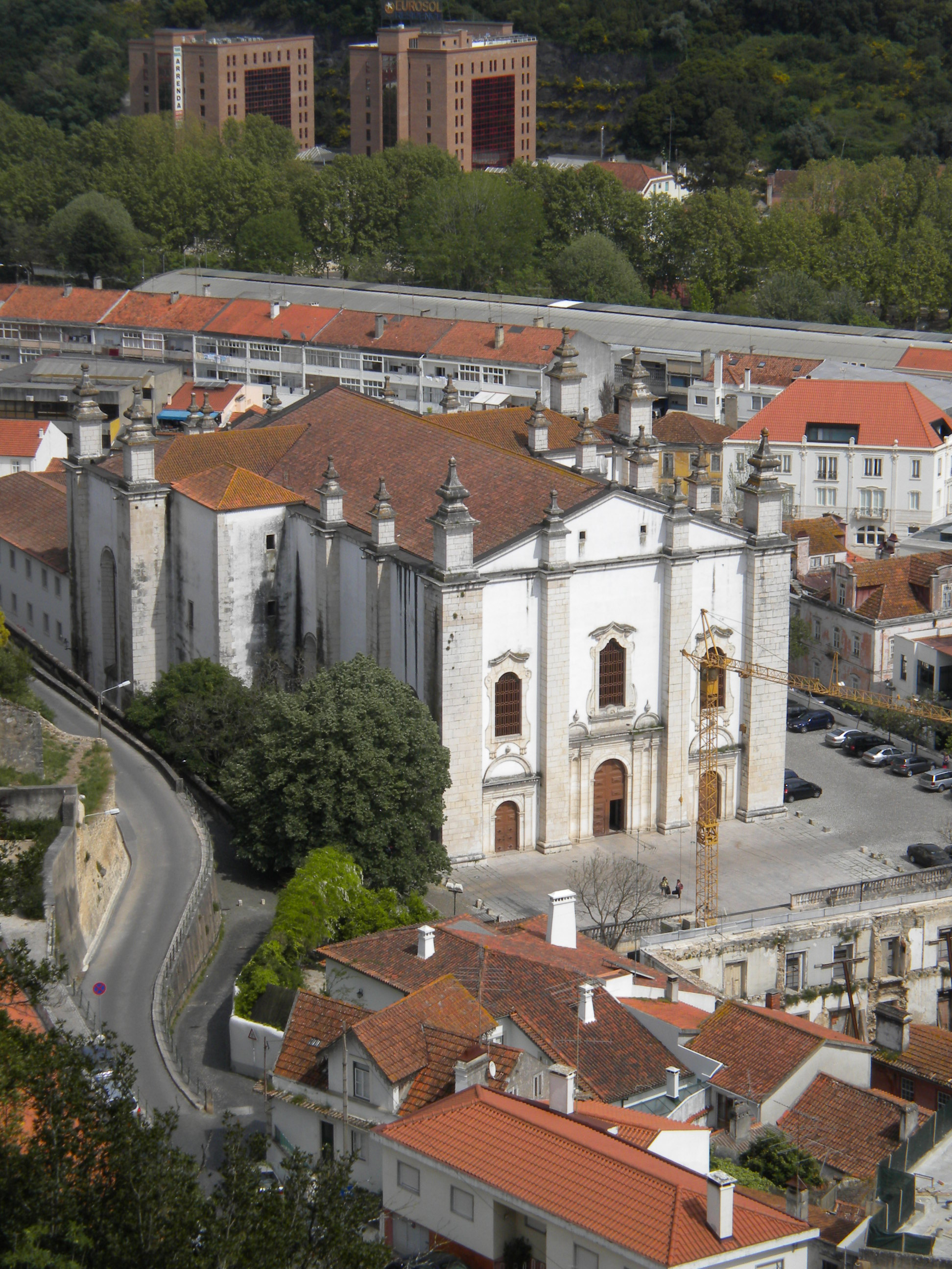 Sé de Leiria